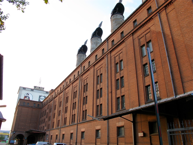 Schultheiss Malzfabrik på Bessemerstrasse i Schöneberg i Berlin